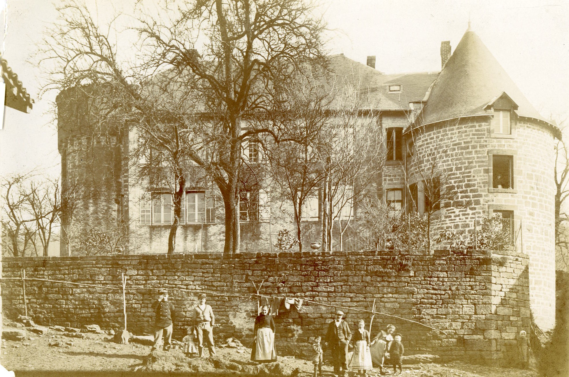 Château de Villette (54), vu du village, vers 1910